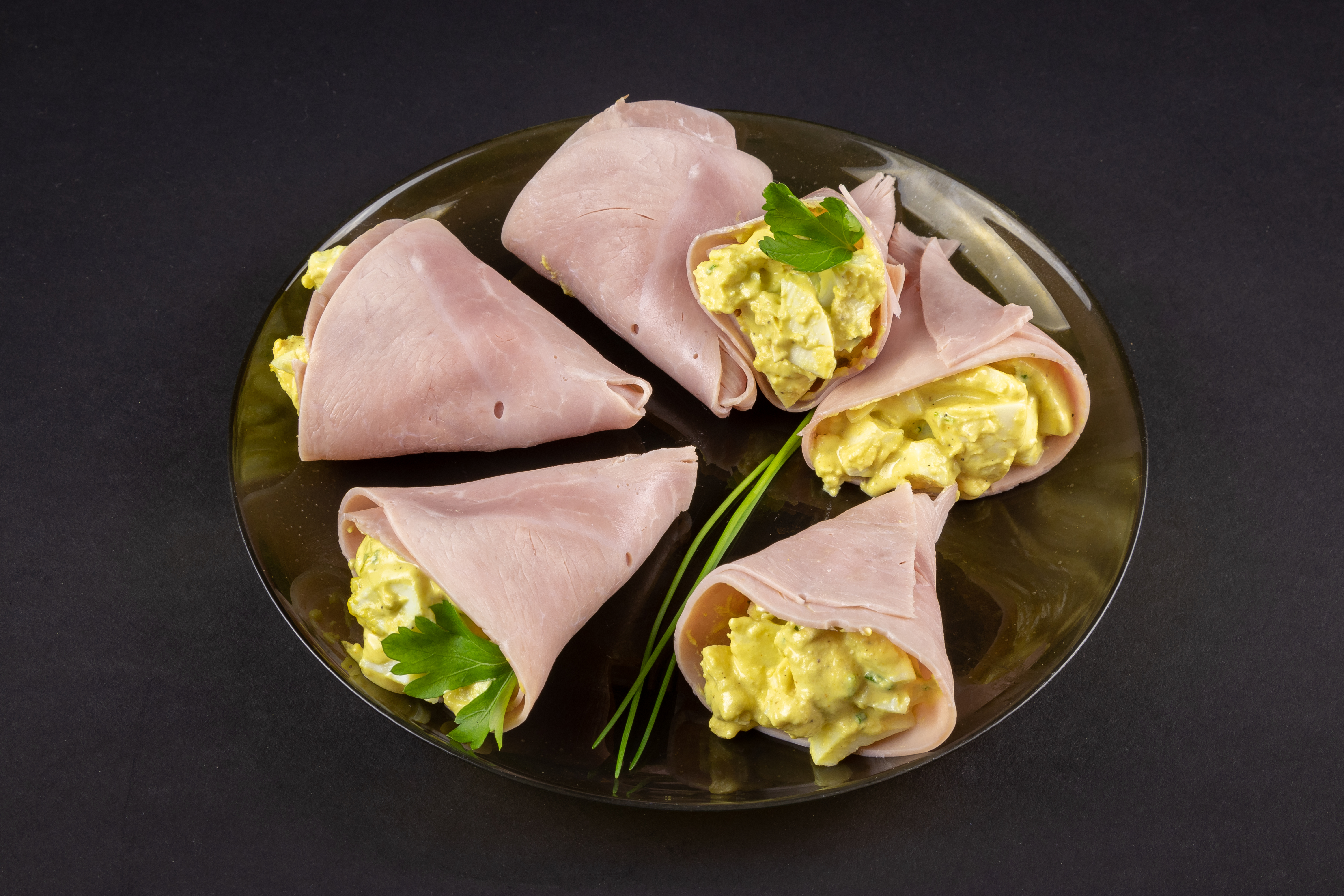 Eierhäckerli in Schinkentüte